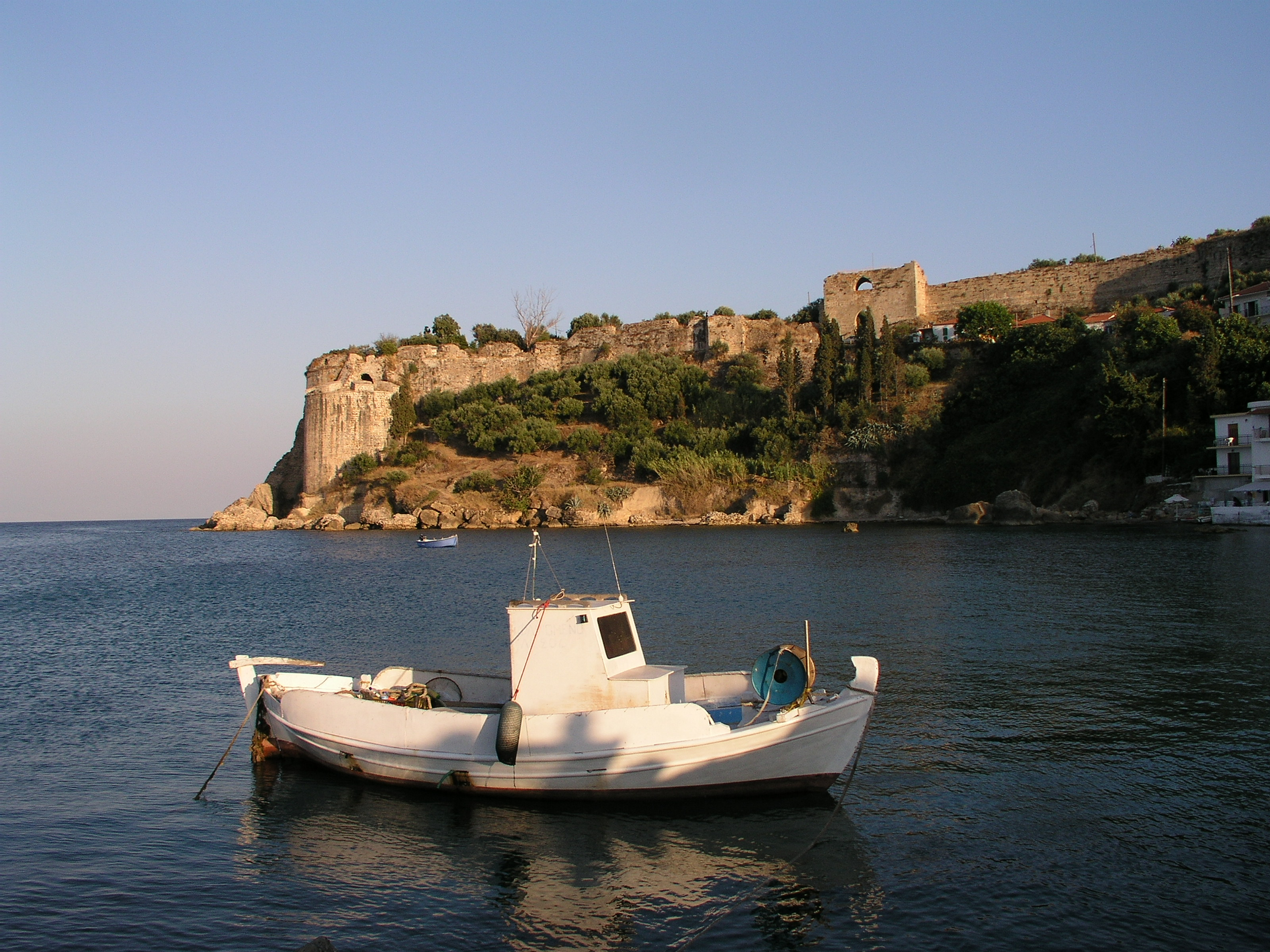 Koroni - Blick vom Hafen auf die Festung